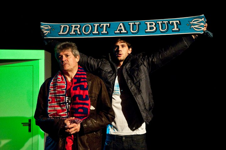 Donald Reignoux et Olivier Rodier